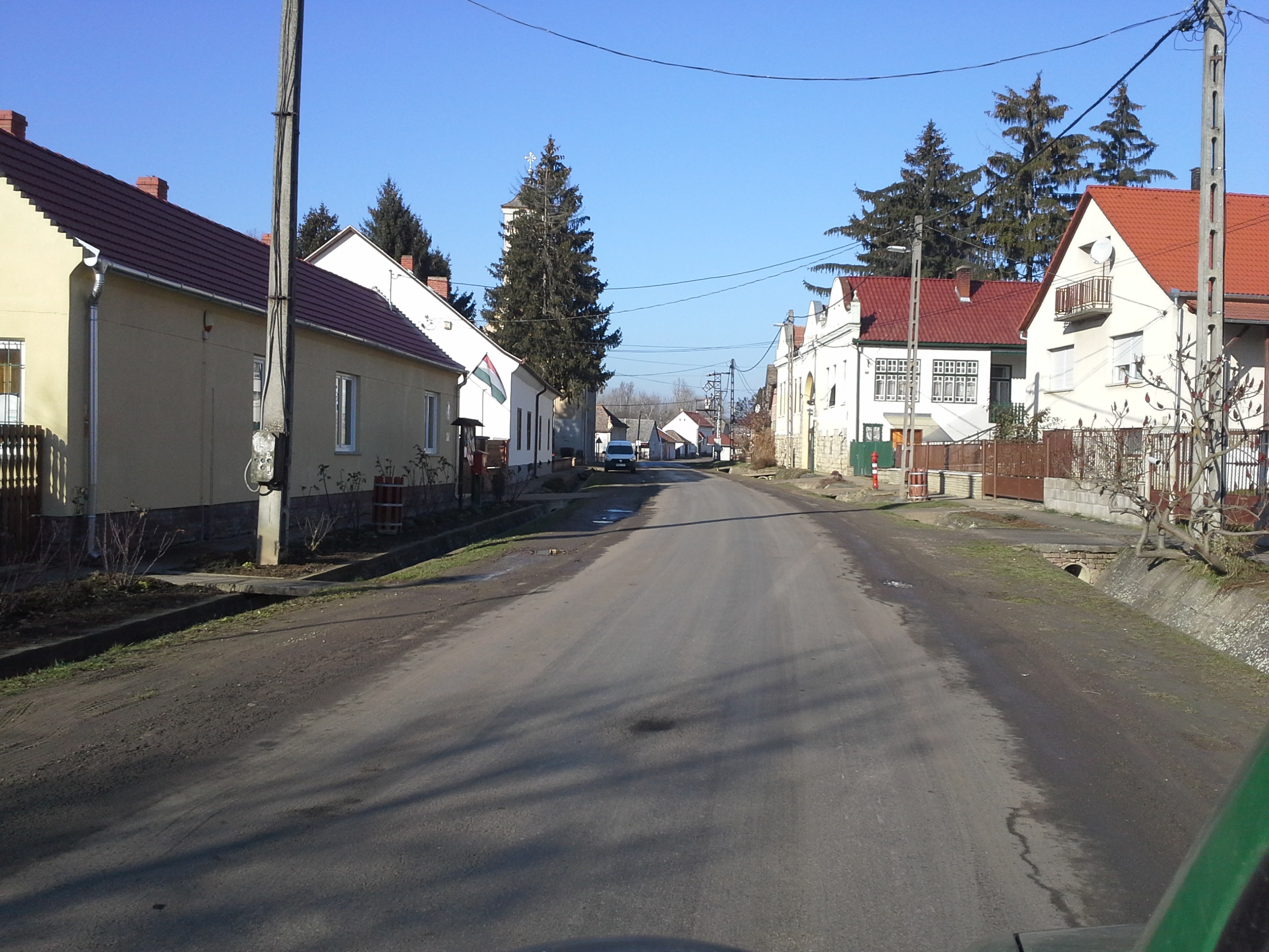 Ellend, faluközpont